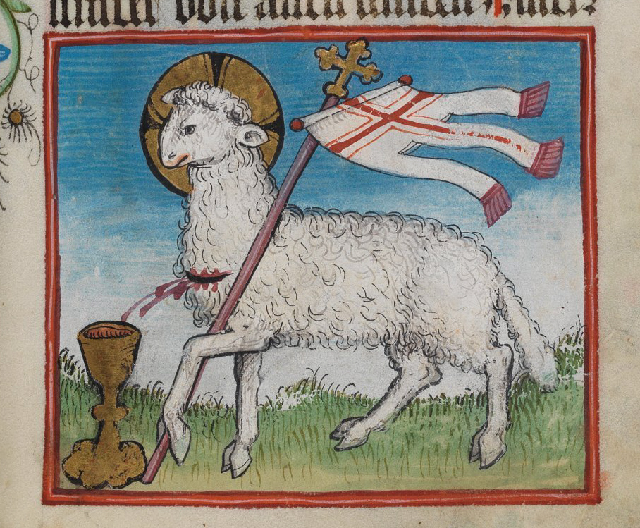 Detail aus dem Waldburg-Gebetbuch, WLB Stuttgart, Cod. brev. 12, fol. 23r